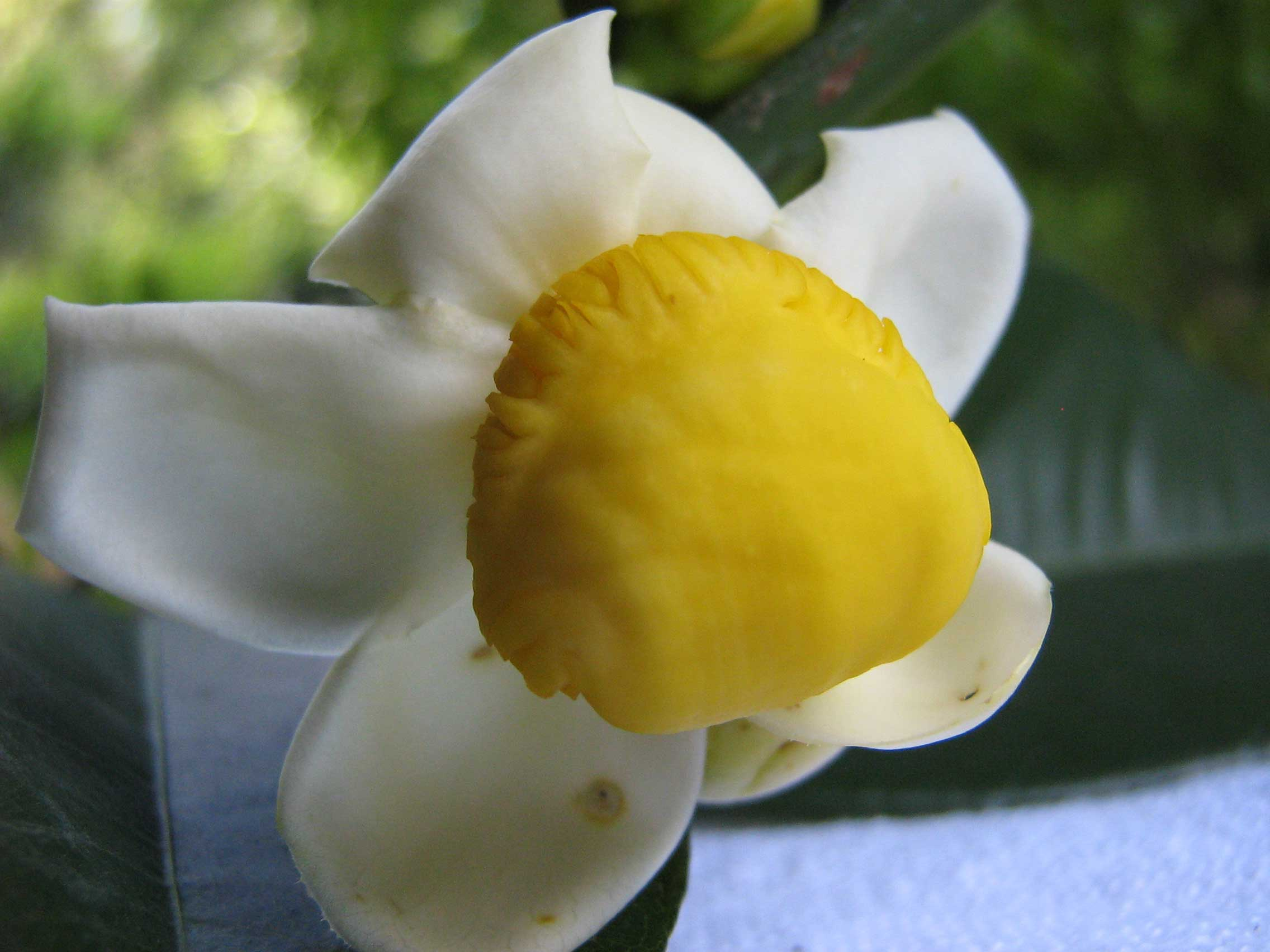 Eschweilera ovata (Cambess.) Miers